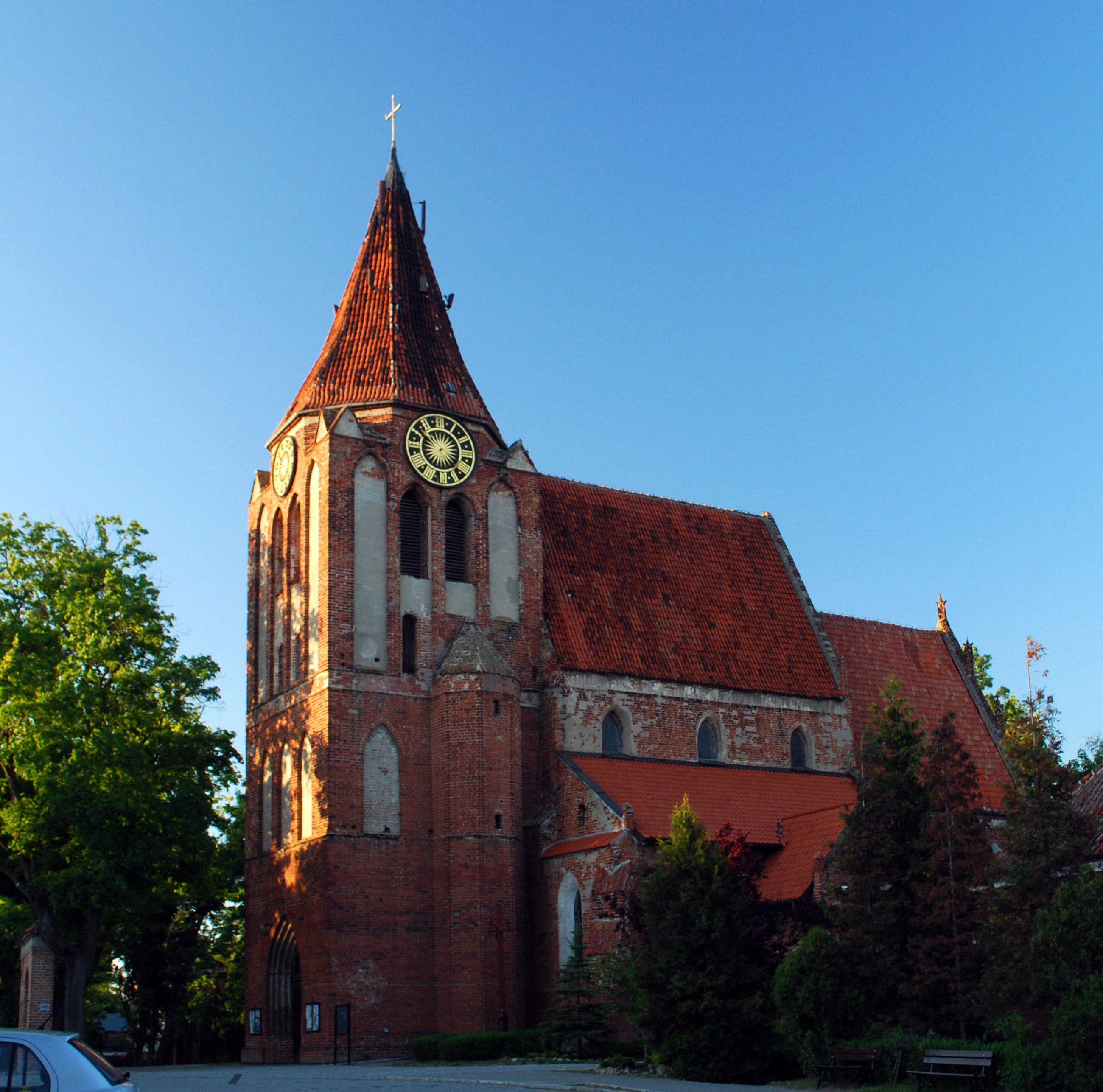 Kościół p.w. Świętego Krzyża w Pruszczu Gdańskim